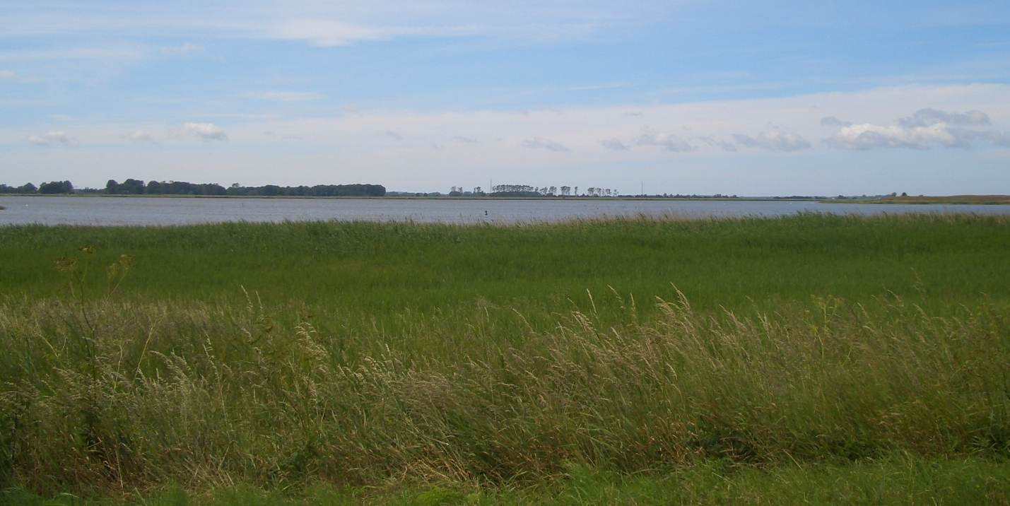 Naturschutzgebiet Neuendorfer Wiek mit Insel Beuchel. In der Ferne sind die Masten der Wittower Fähre zu erkennen.